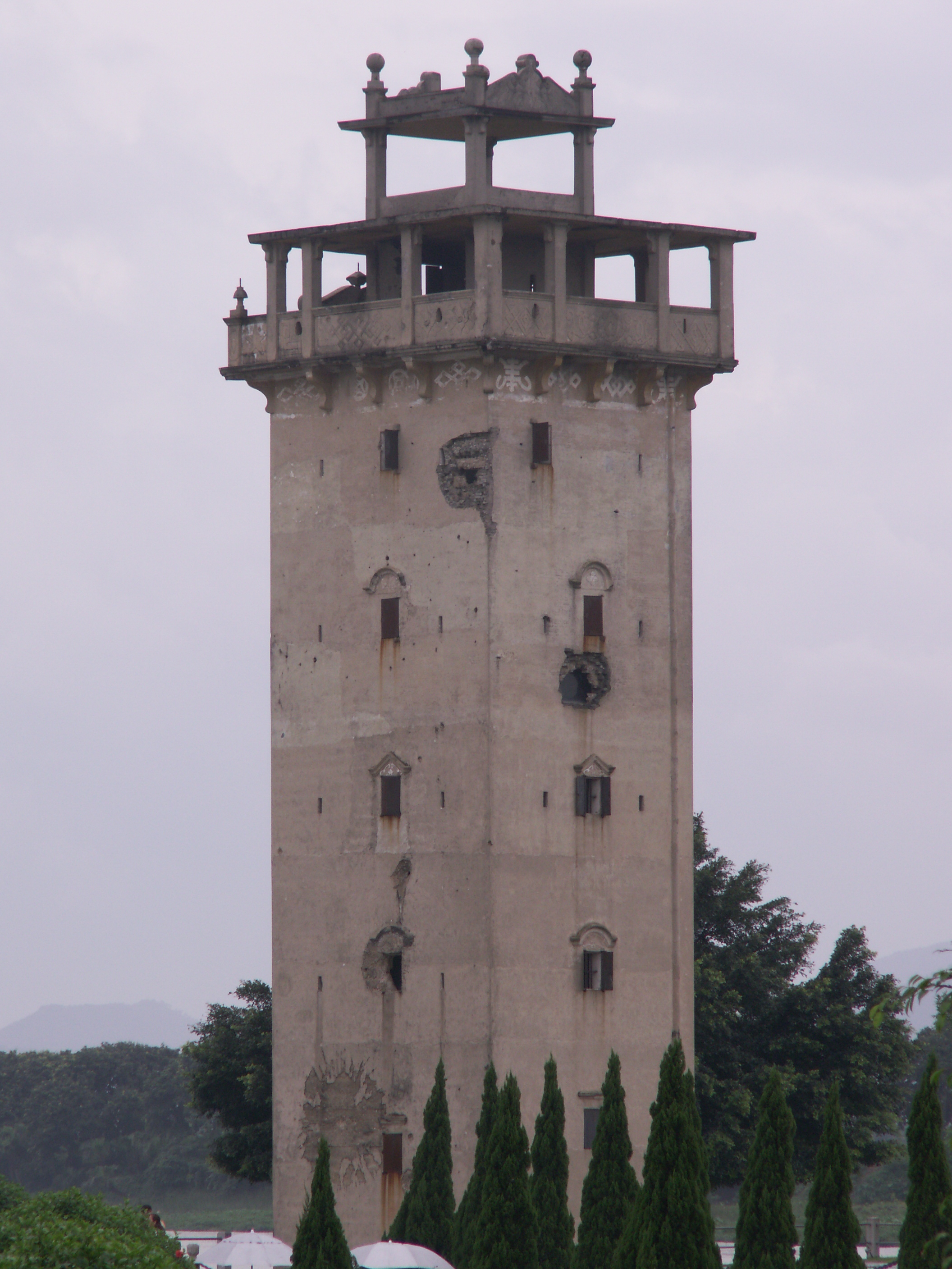 南樓 diaolou in Chikan, Kaiping